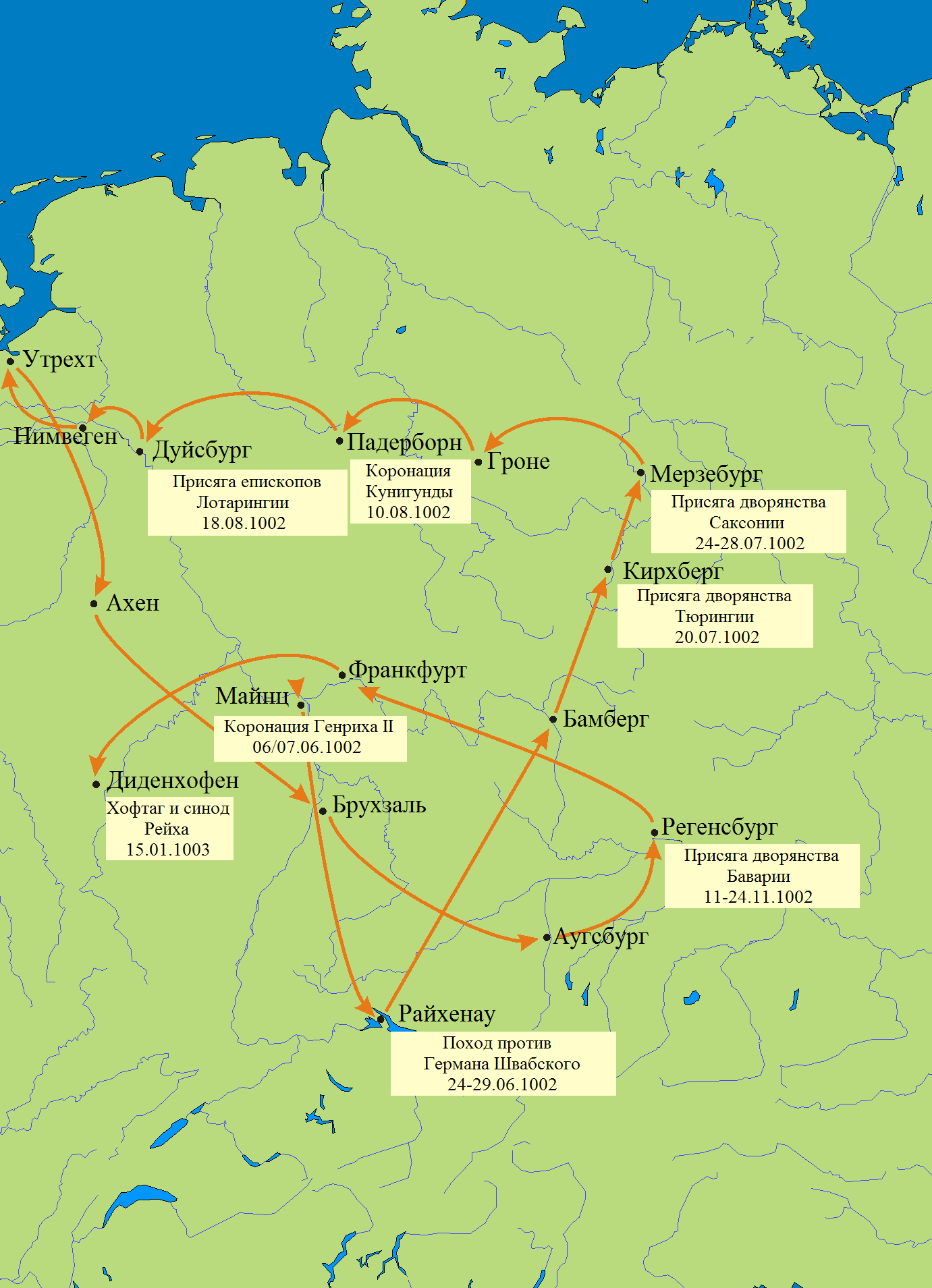 der Königsumritt Heinrich II.